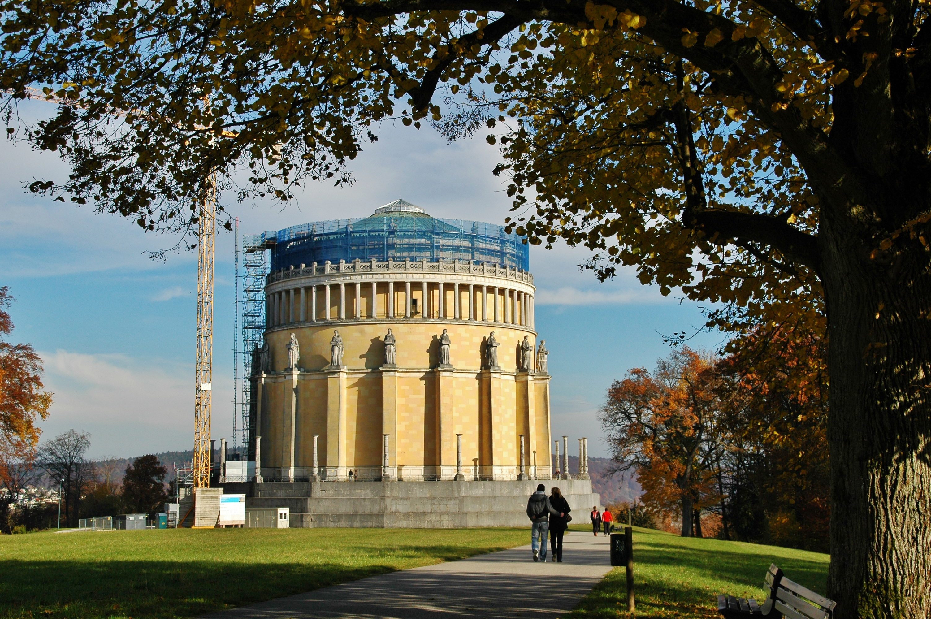 Befreiungshalle in Kelheim: Im Andenken an die gewonnenen Schlachten gegen Napoleon (1813 bis 1815); Auftraggeber König Ludwig I. von Bayern